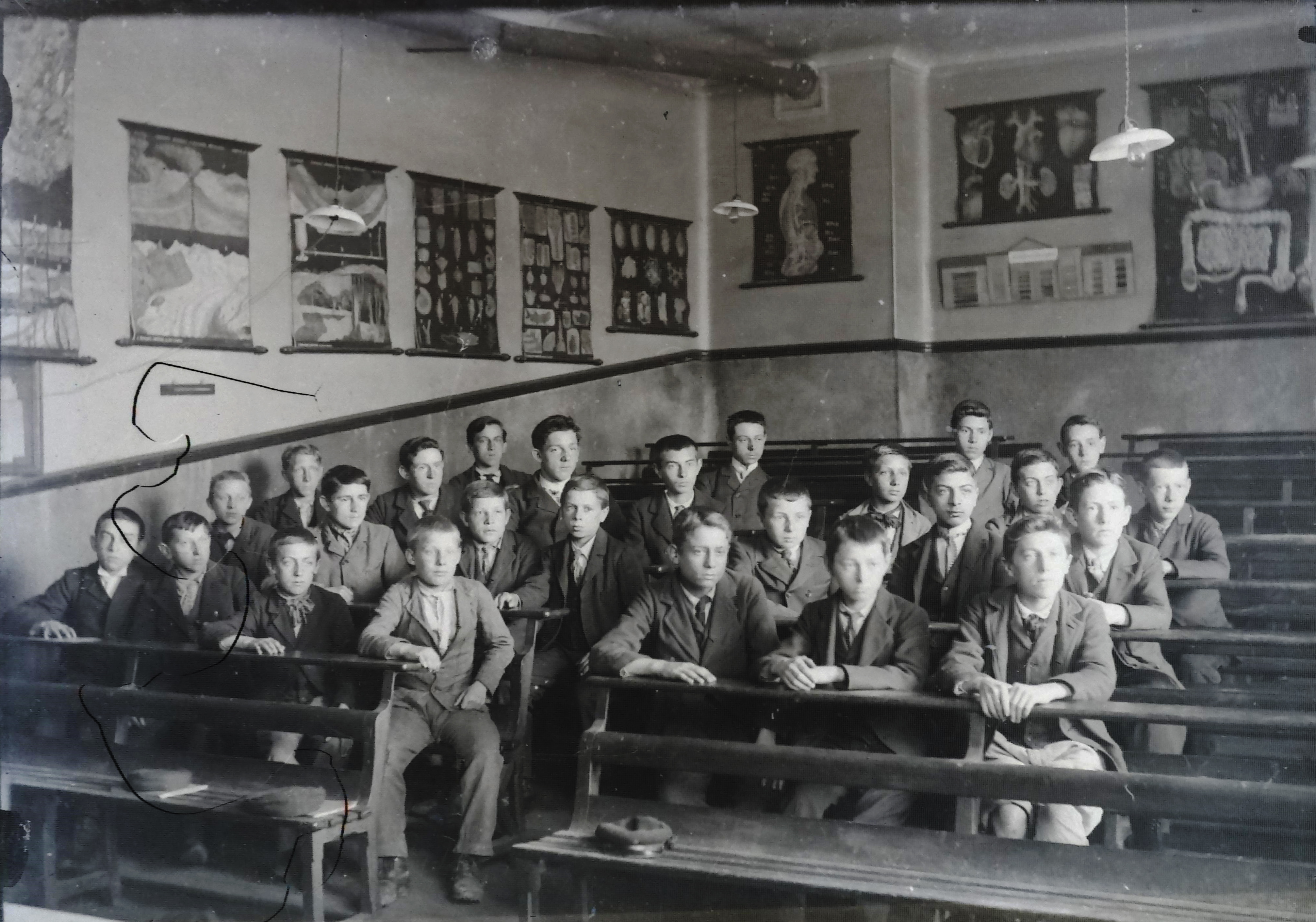 Elèves de l'école pratique d'industrie du Havre , début XXème.